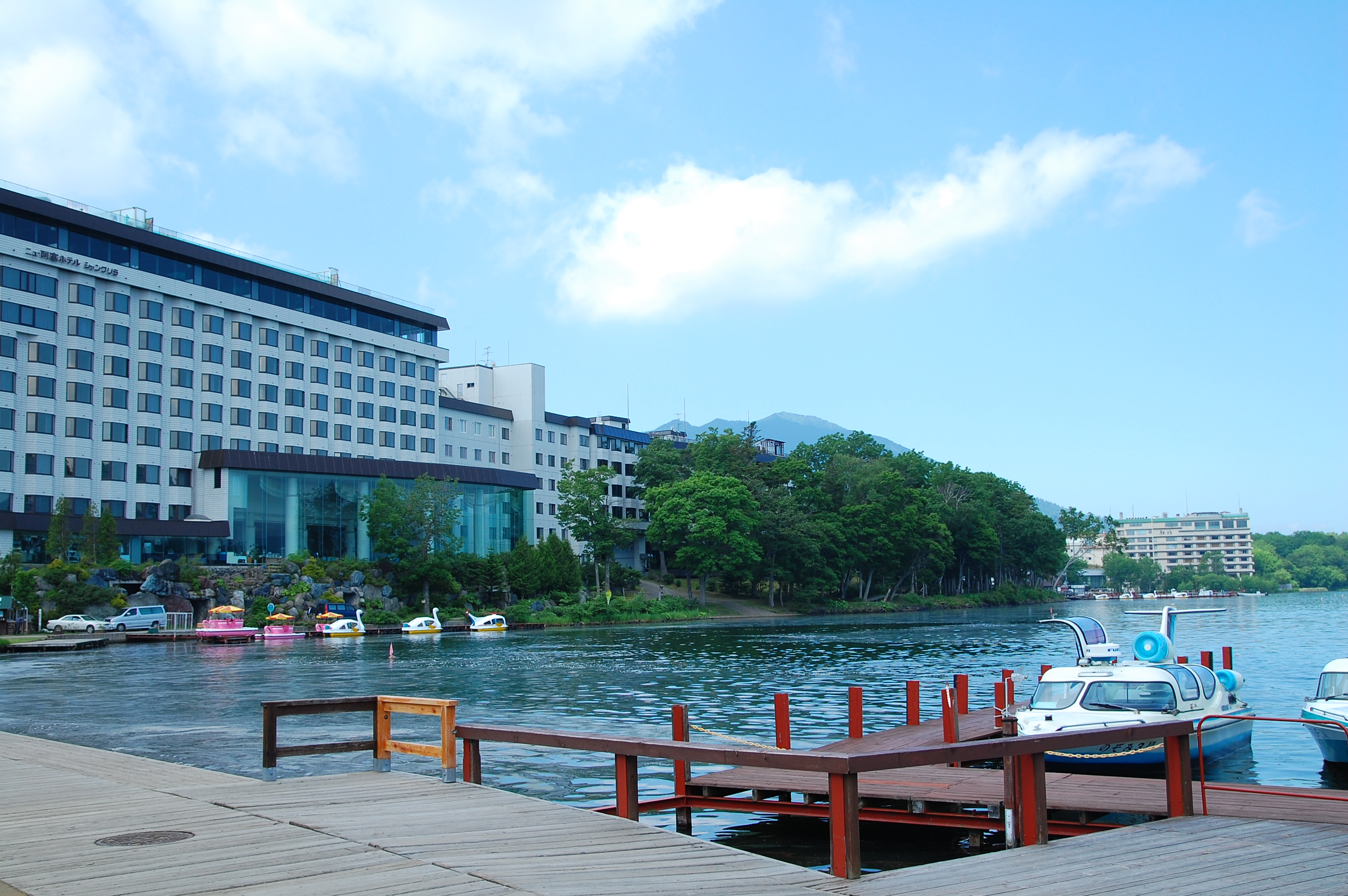 ニュー阿寒ホテル